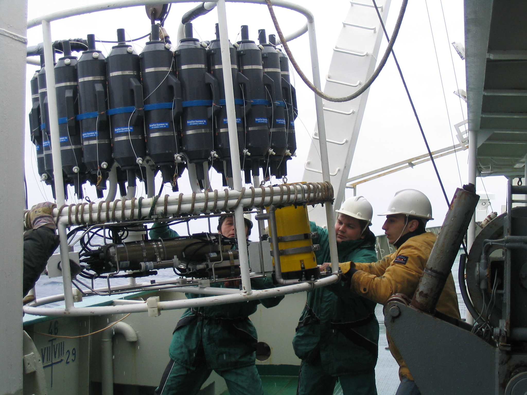 Работа студентов на научно-исследовательских судах